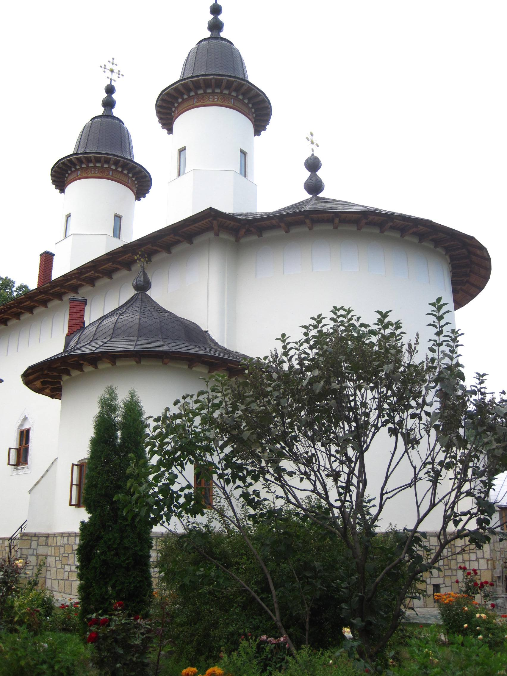 Monastère VaratecRomână: Mănăstirea Văratic, sat Văratec